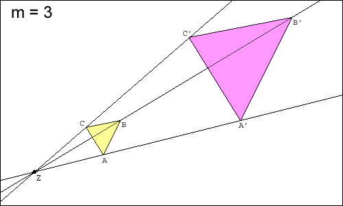 Zentrische Streckung mit positivem Streckungsfaktor